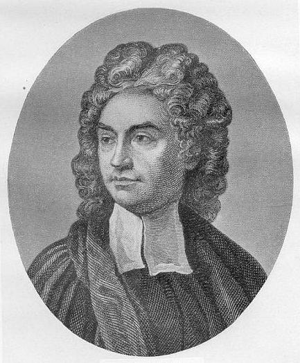 Richard Bentley (1662–1742), englischer klassischer Philologe. Stich von William Sharp (1749–1824) nach einem Gemälde von James Thornhill (1675/1676–1734).